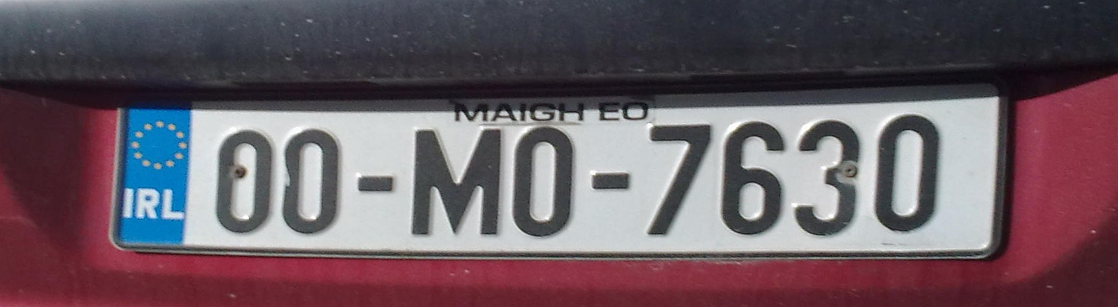 Irlandzka tablica rejestracyjna: MO = Mayo = Maigh Eo